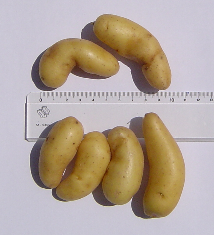 Photo de rattes au Touquet-Paris-Plage